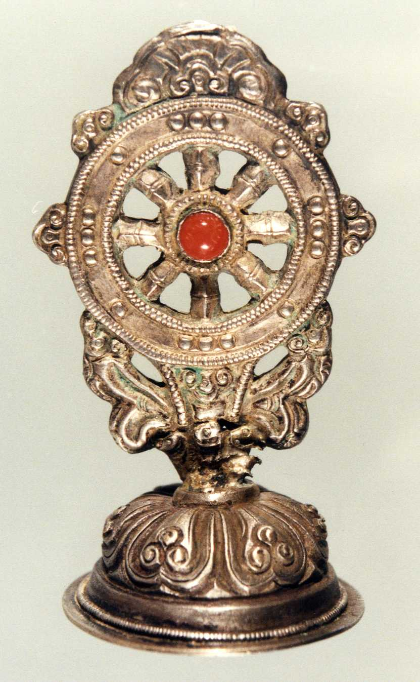 Koło Dharmy - Zbiory Muzeum Azji i Pacyfiku w Warszawie